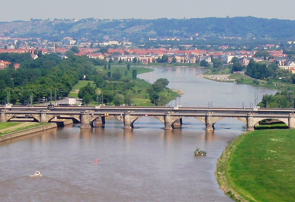 Die Marienbrücke Dresdens von der Aussichtsplattform der Frauenkirche aus fotografiert.